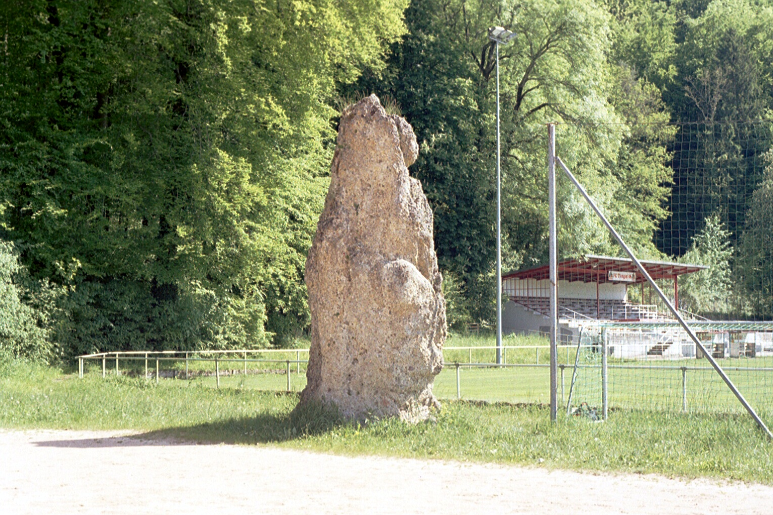 Landkreis Waldshut – Menhir beim Sportplatz Tiengen an der Wutach.